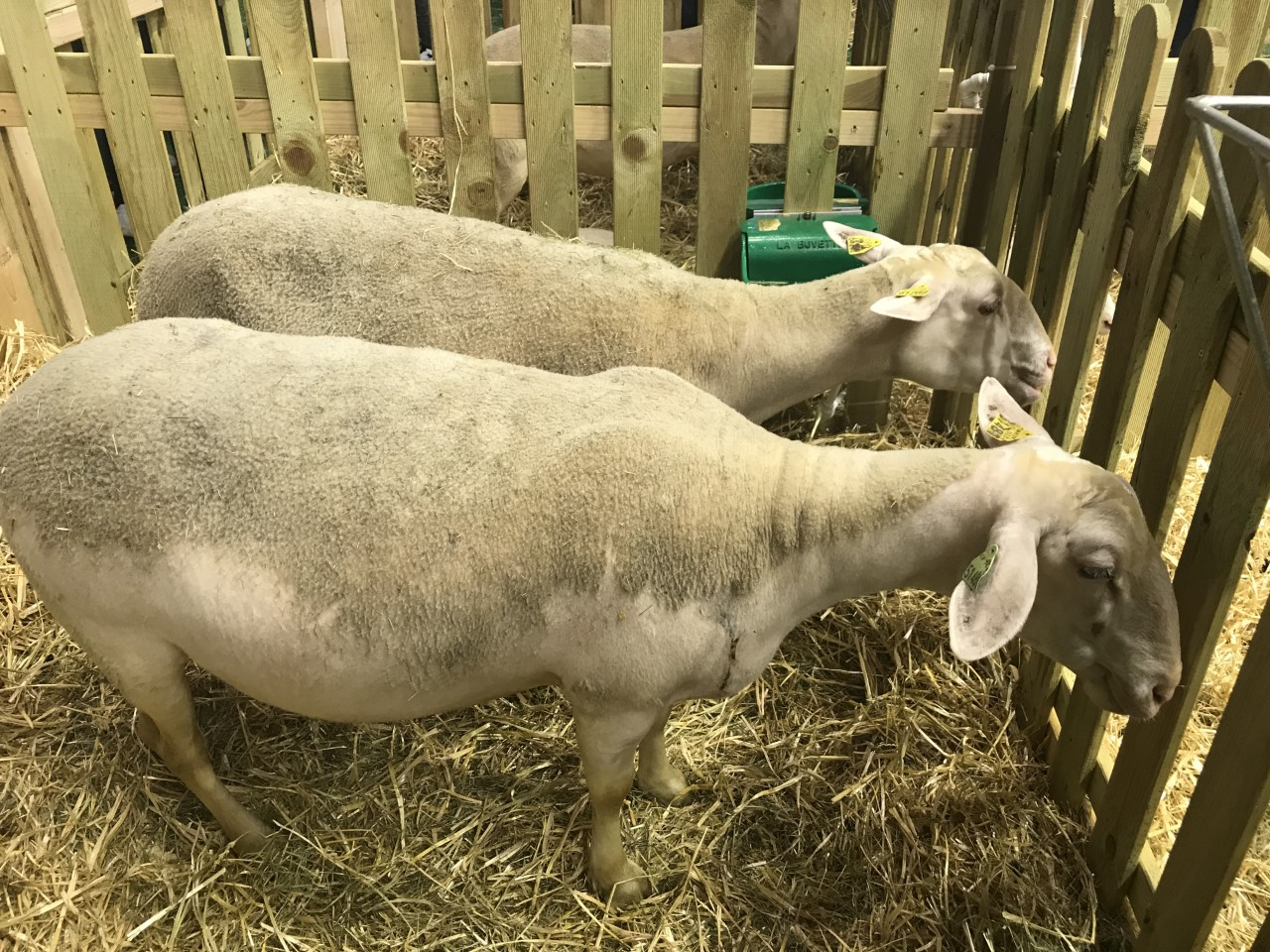 Brebis du Massif Central au SIA 2020.